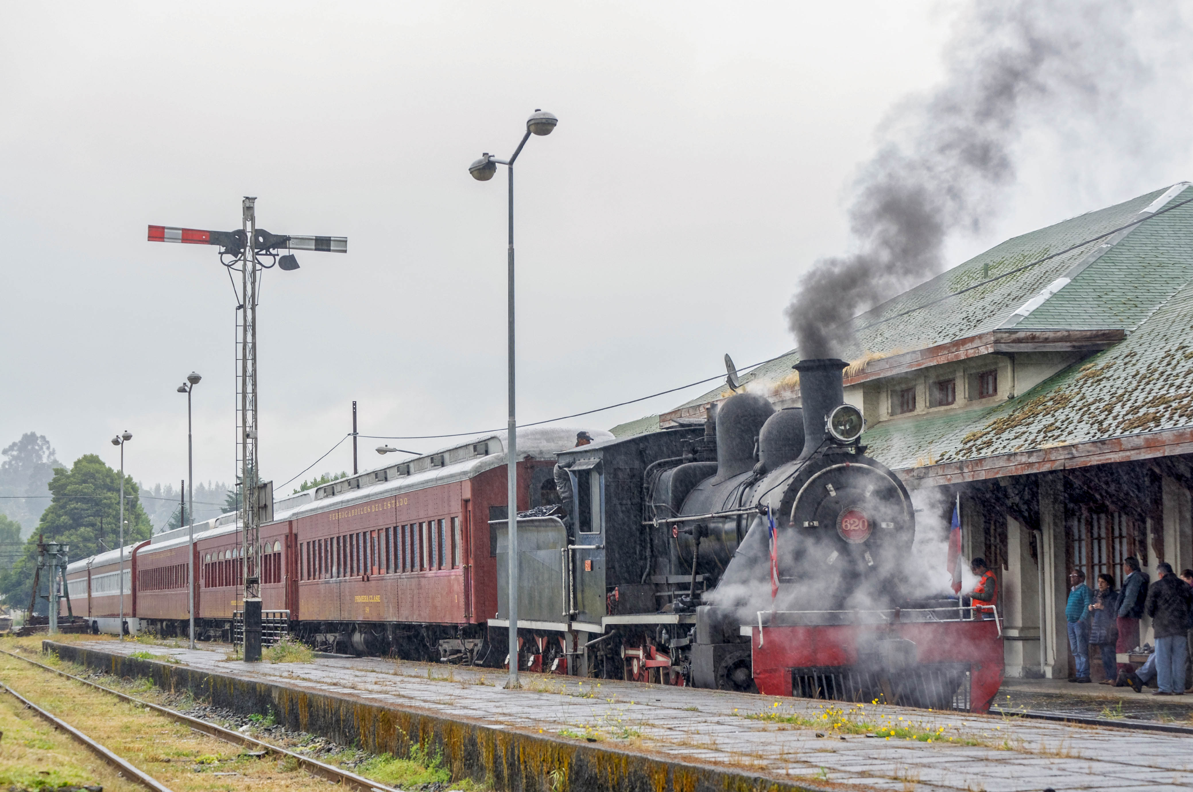 Quizas, una imagen que representa lo que en antaño era algo tan cotidiano, y que hoy es casi un evento del cual no nos podiamos dar el lujo de estar ausentes. Bajo la copiosa lluvia del sur, la pequeña 620 espera la carga de agua para poder emprender el regreso hacia Valdivia, luego de un día cargado a las emociones, tras el viaje del tren del recuerdo entre los pequeños poblados de Pichi ropulli, Los Conales, Rapaco y La Union.